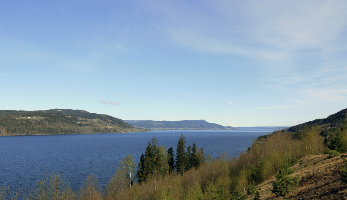 Lake Mjøsa seen northwards from Minnesund, Eidsvoll.